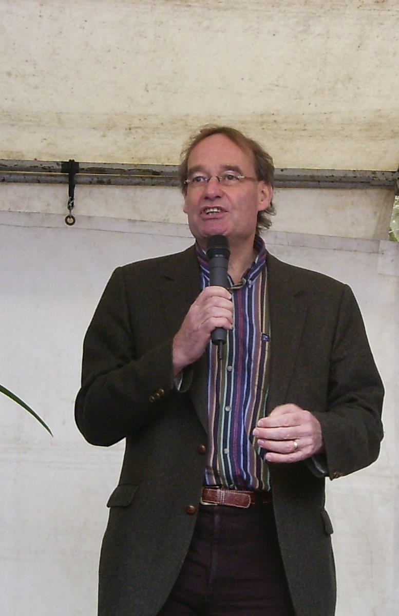 Weerman Harrie Otten